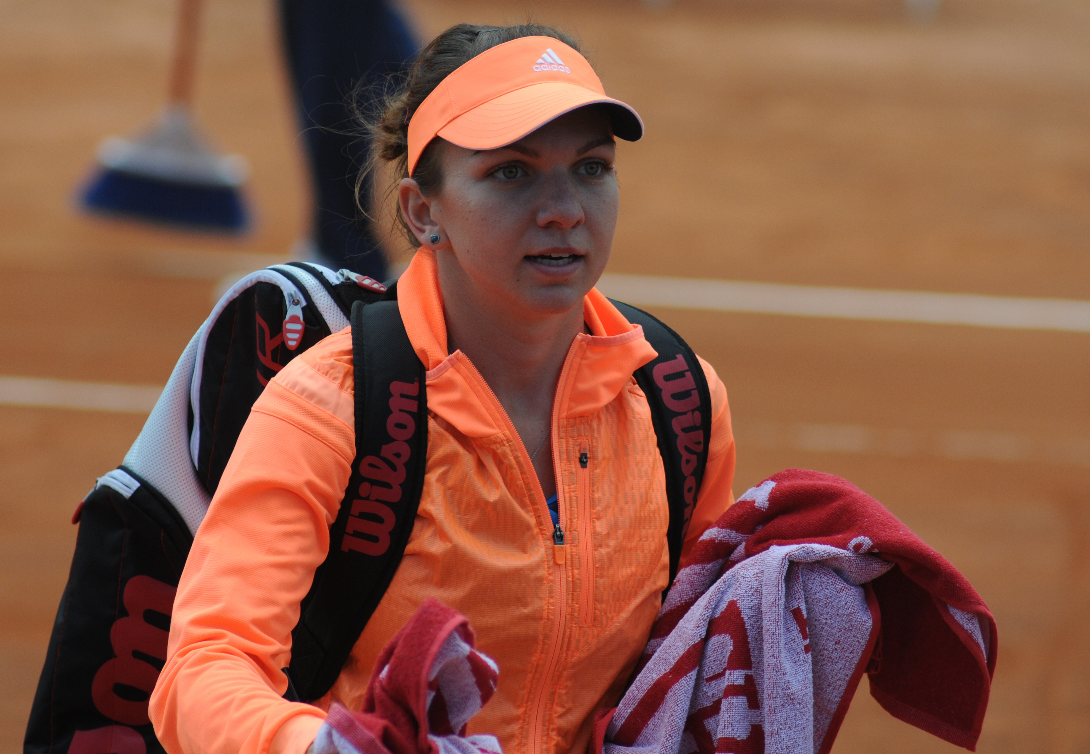 Simona Halep at the 2014 Internazionali BNL d'Italia